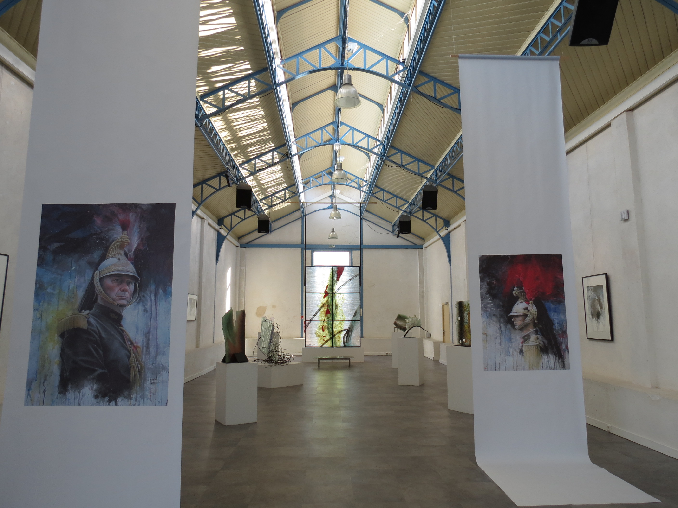 Intérieur de l'Atelier Legault, exposition de février 2014